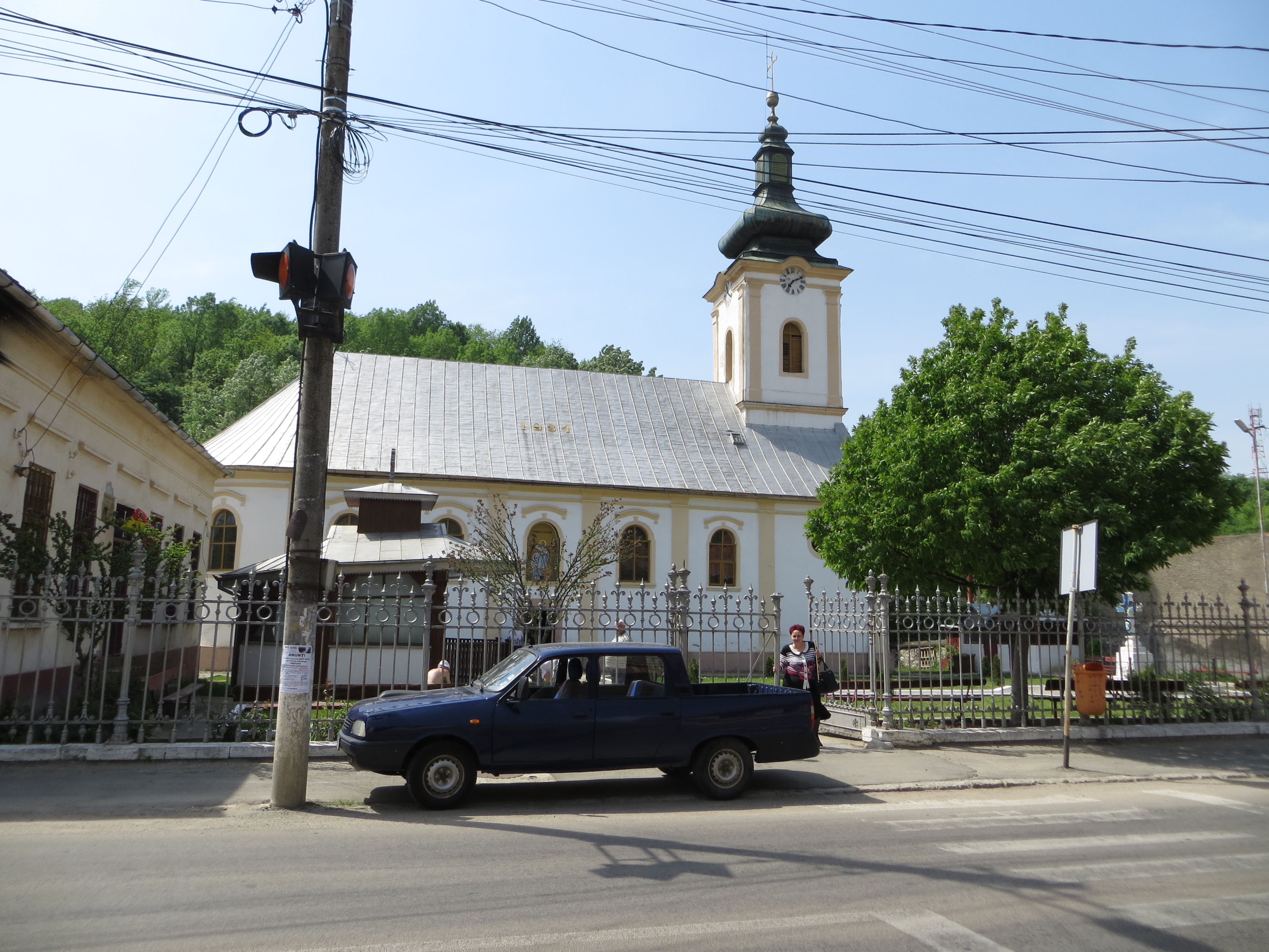 Biserica "Sf. Ilie"